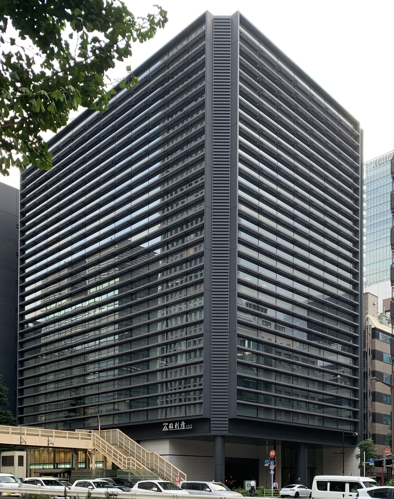 日立物流本社ビル